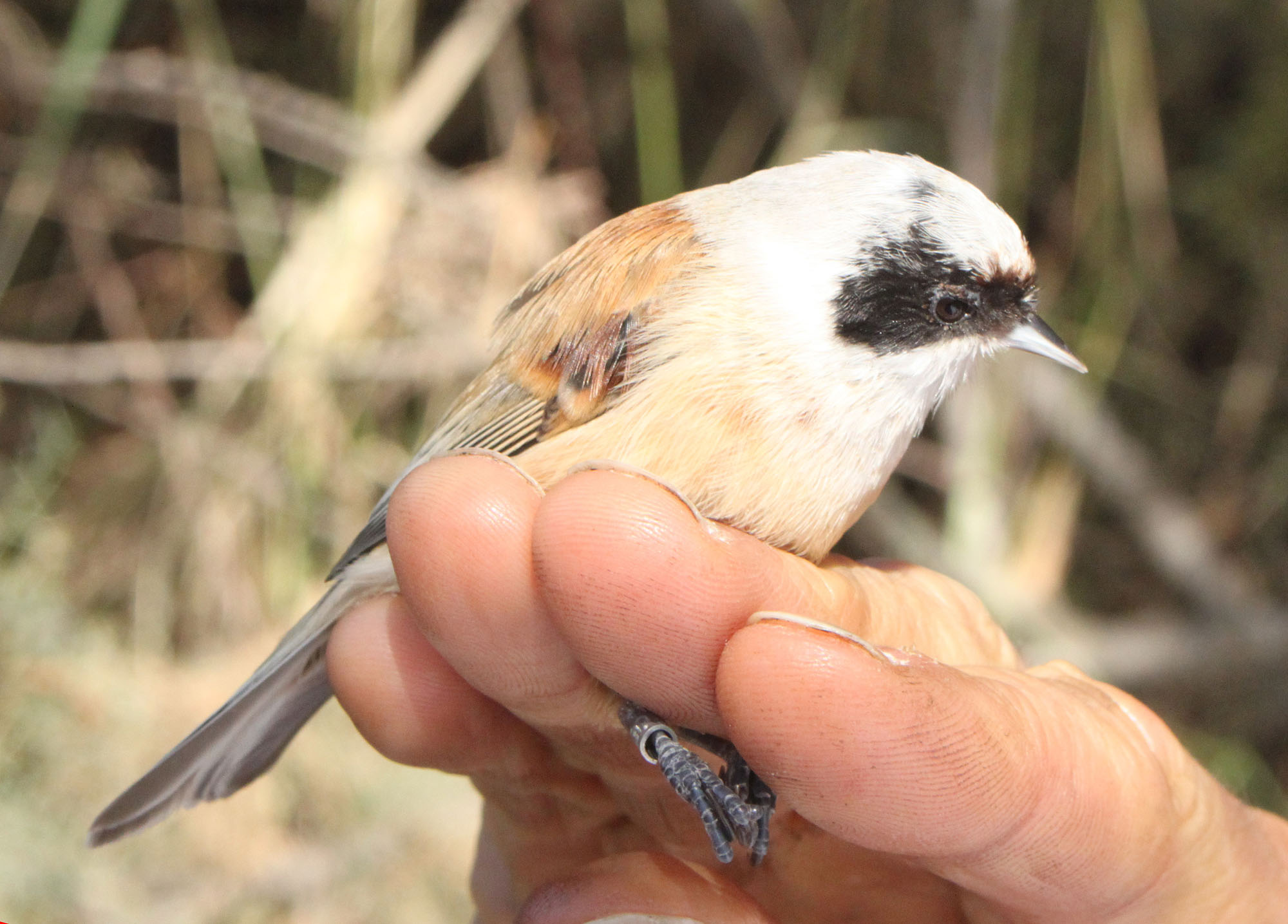 Rémiz penduline mâle photographié sur le camp de baguage de Saint-Marcel à Mauguio (France, département de l'Hérault)